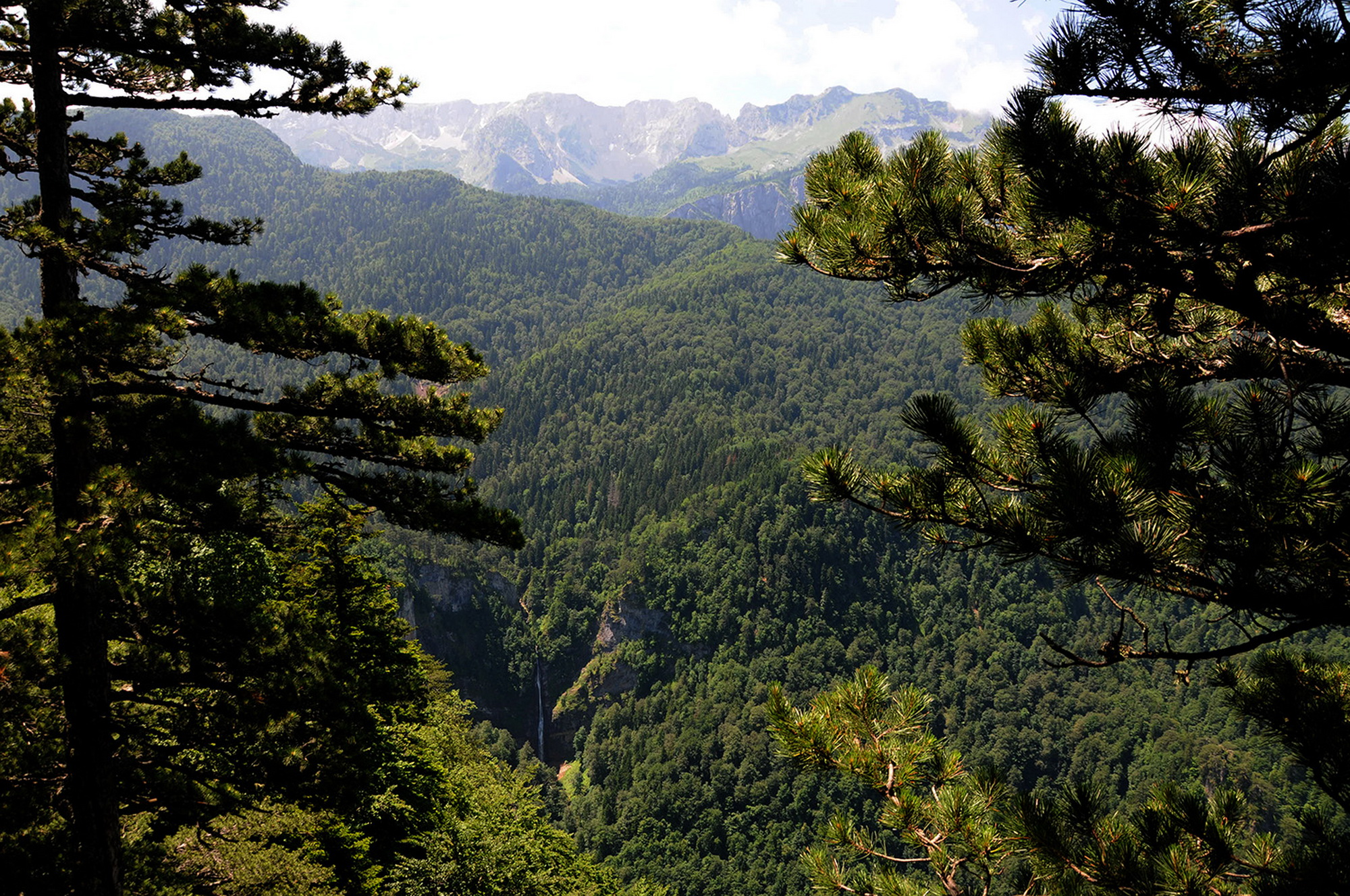 NP sutjeska pogledn na prasumu perucicu i vodopad skakavac This image was uploaded as part of Trace of Soul 2015.